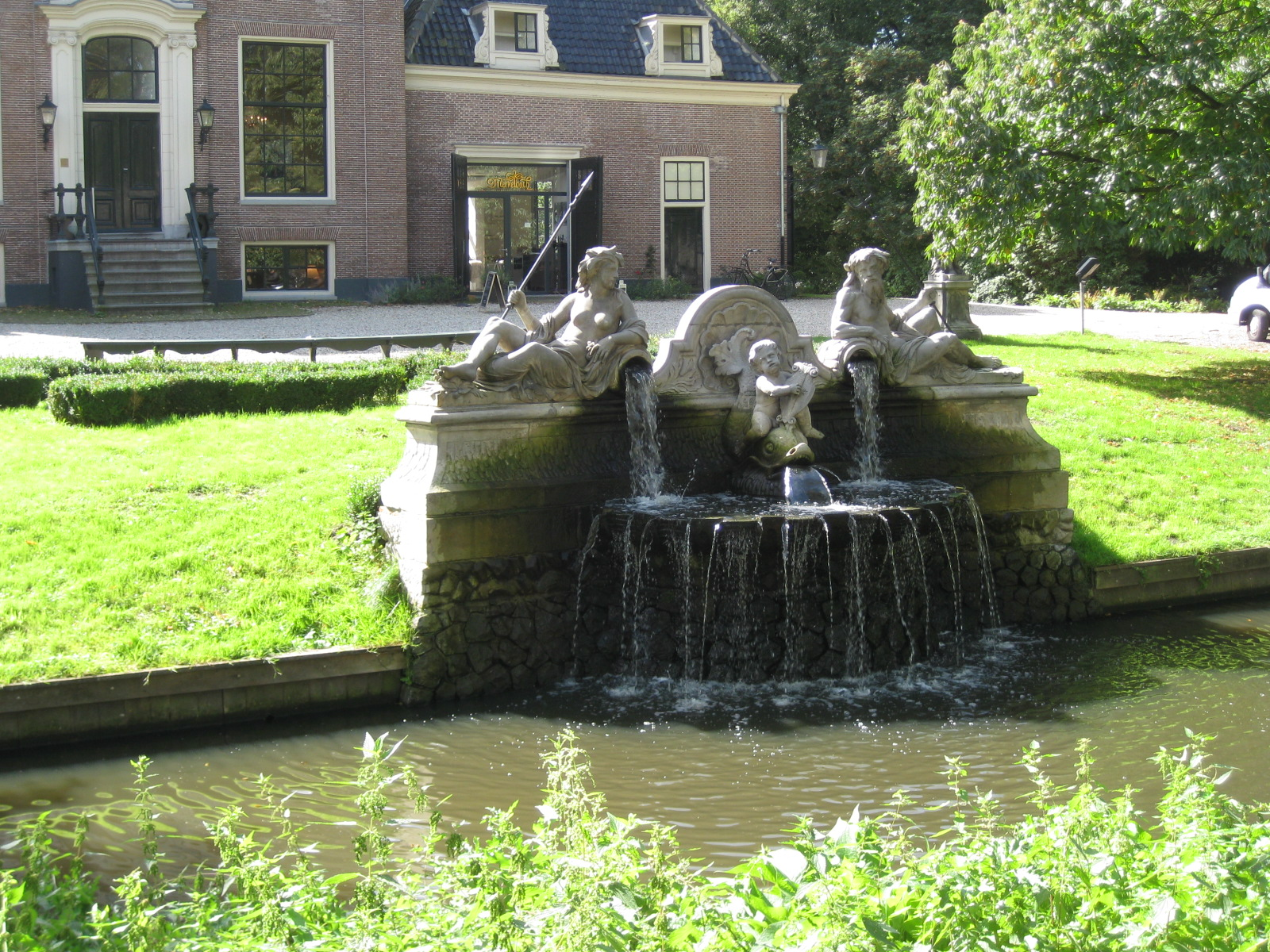 Marmeren fontein met beelden van Neptunus, Amphitrite en Arion in Park Frankendael in Amsterdam. 1714 beeldhouwer Ignatius van Logteren